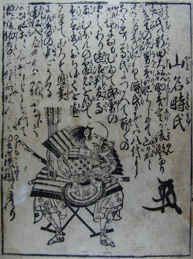 yamana_tokiuji